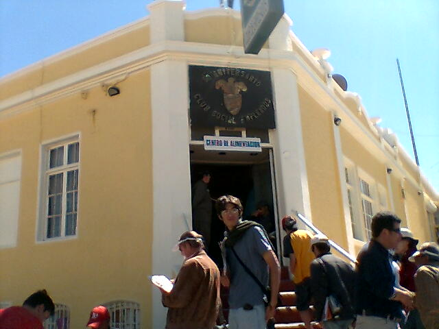 Xhuquicamat el dia de su despedida